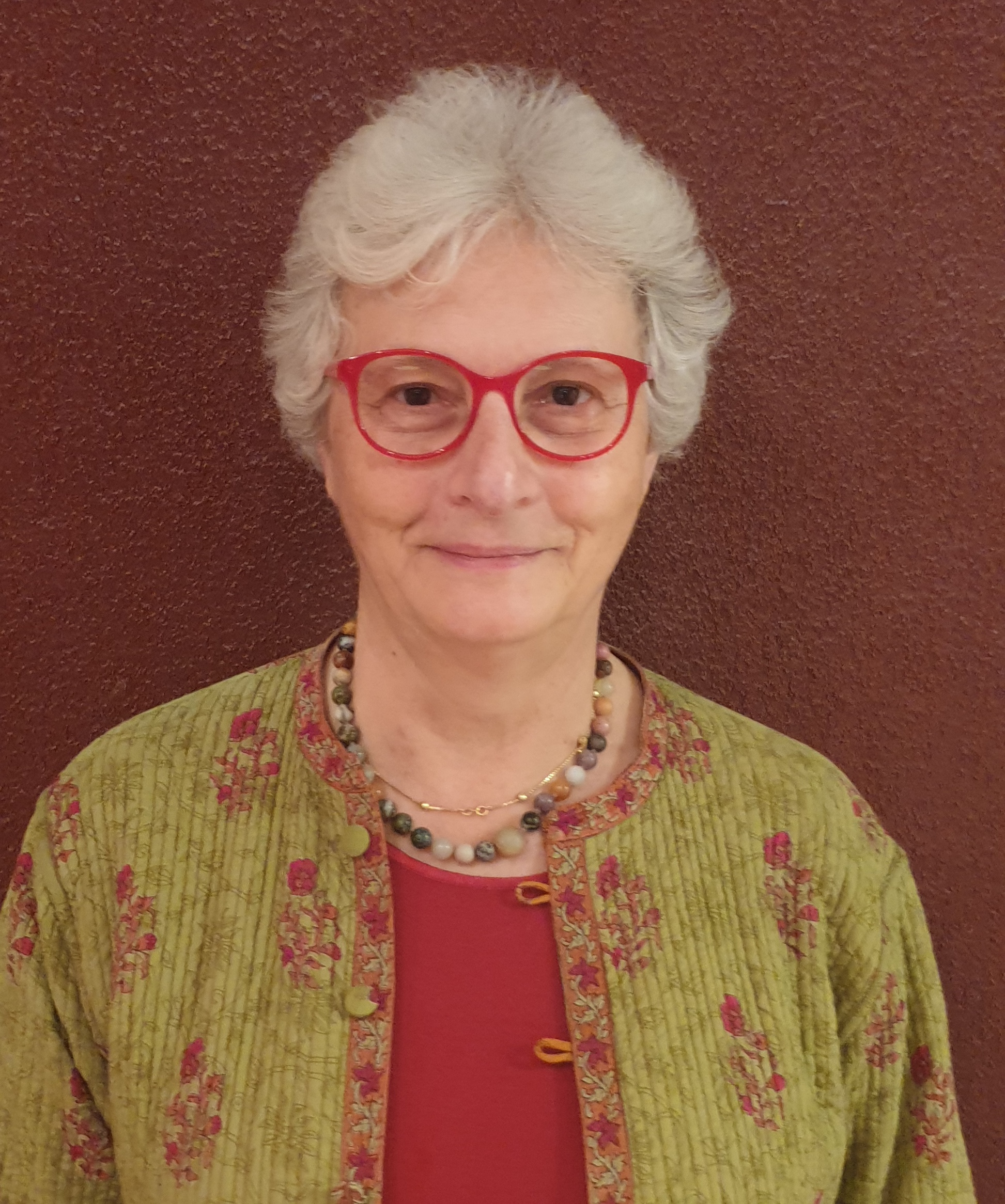 Intellectual historian: subst:PAGENAME subst:#if:| {2 }: subst:PAGENAME | subst:#if:| {3 }: subst:PAGENAME | subst:#if:| {4 }: subst:PAGENAME | subst:#if:| {5 }: subst:PAGENAME | subst:#if:| {6 }: subst:PAGENAME | subst:#if:| {7 }: subst:PAGENAME | subst:#if:| {8 }: subst:PAGENAME | subst:#if:| {9 }: subst:PAGENAME | subst:#if:| {10 }: subst:PAGENAME